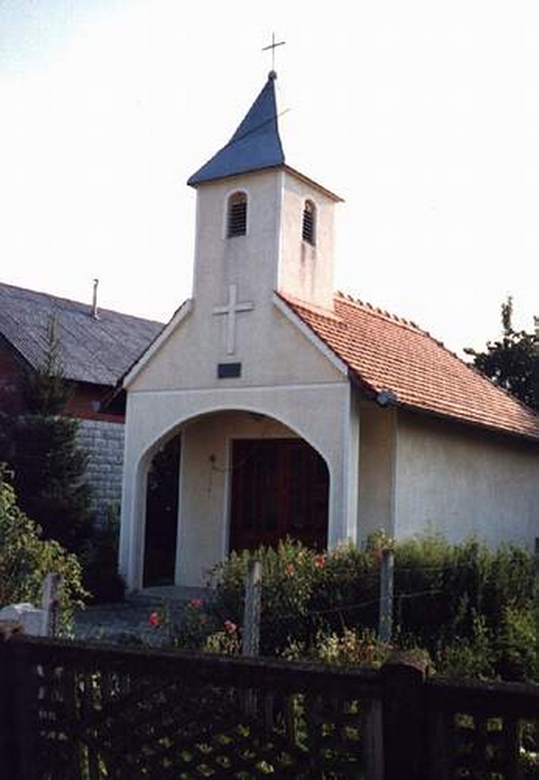 Vrhovec - Chapel